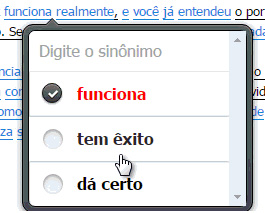 Caixa de Sinônimos do .br